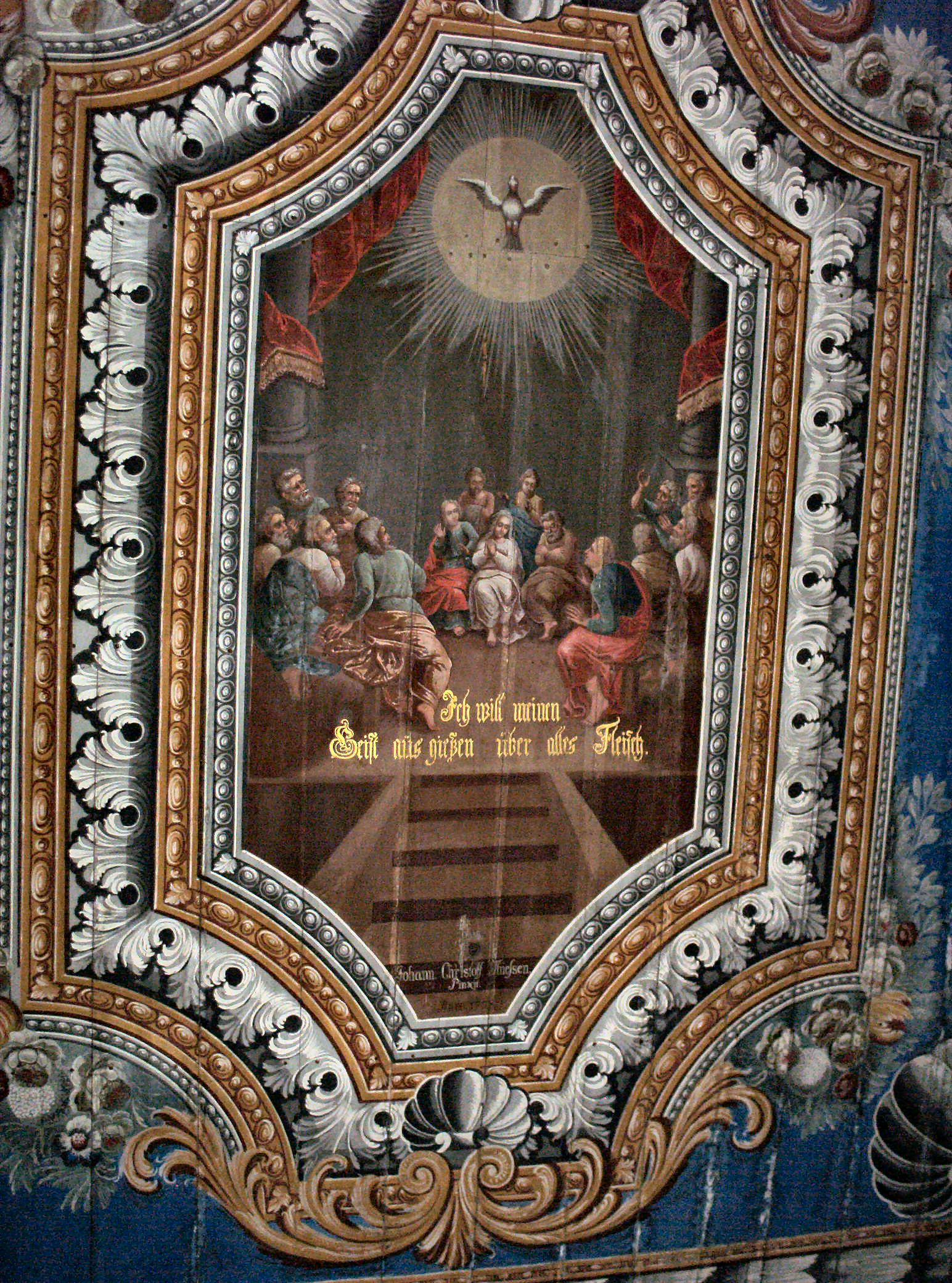 Plafon kościoła w Wierzbnie (fragment)